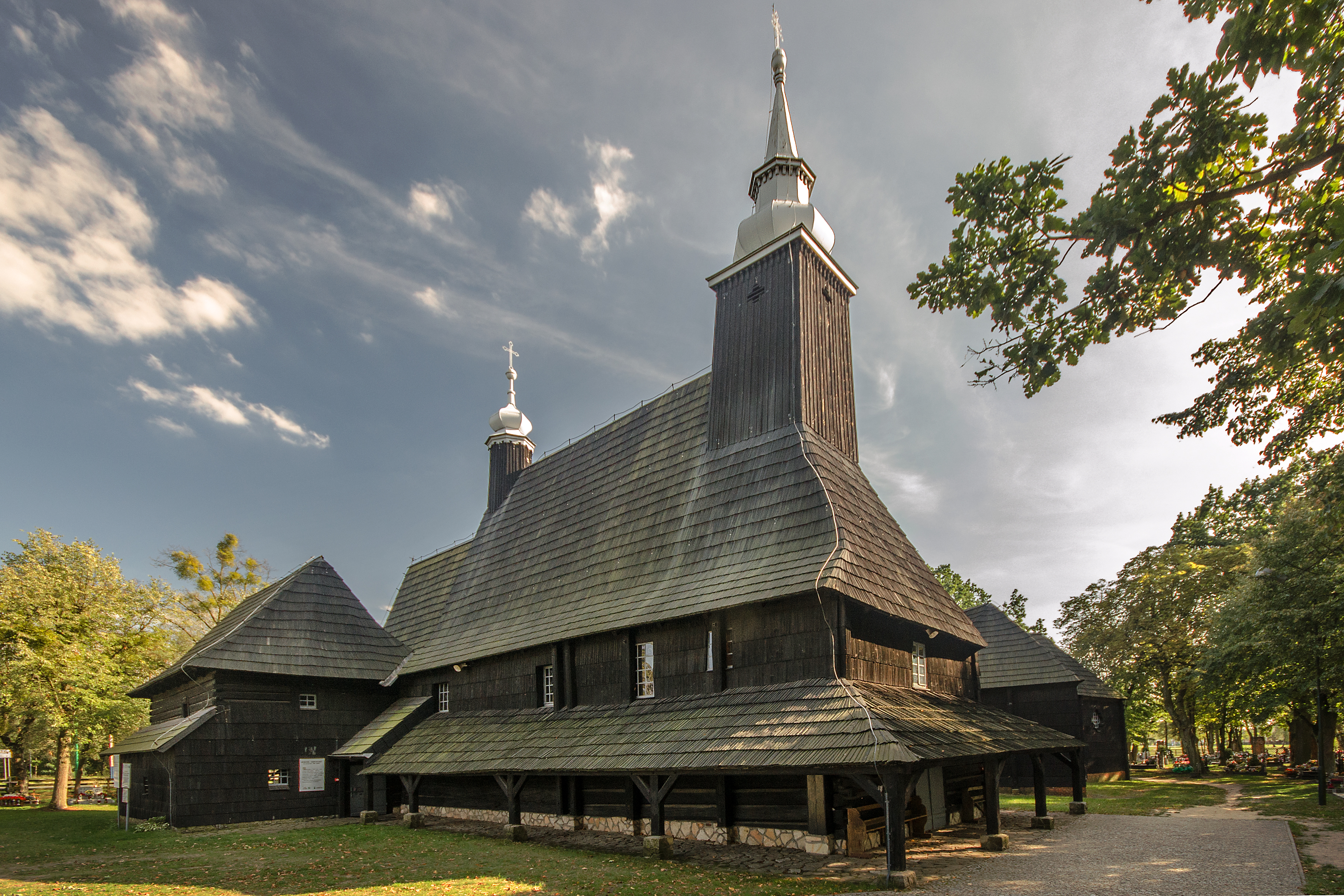 Olesno, kościół odpustowy pw. św. Anny, 1518, 1668-1670